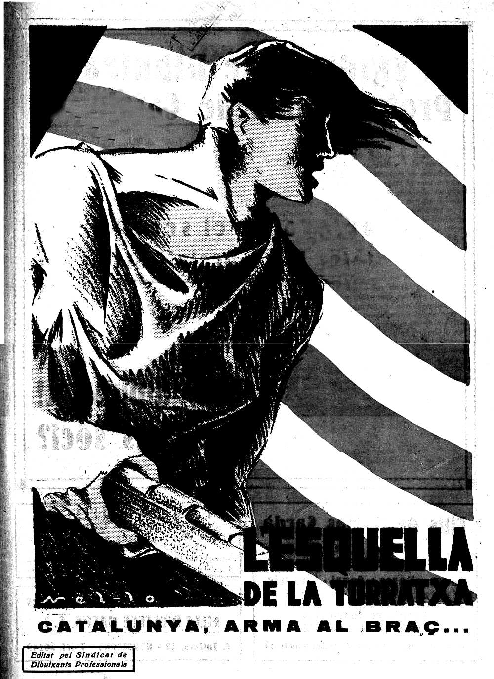 La Catalunya arma al brac...